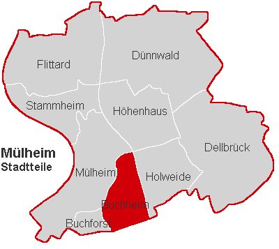 Lagekarte Buchheim im Stadtbezirk Köln-Mülheim